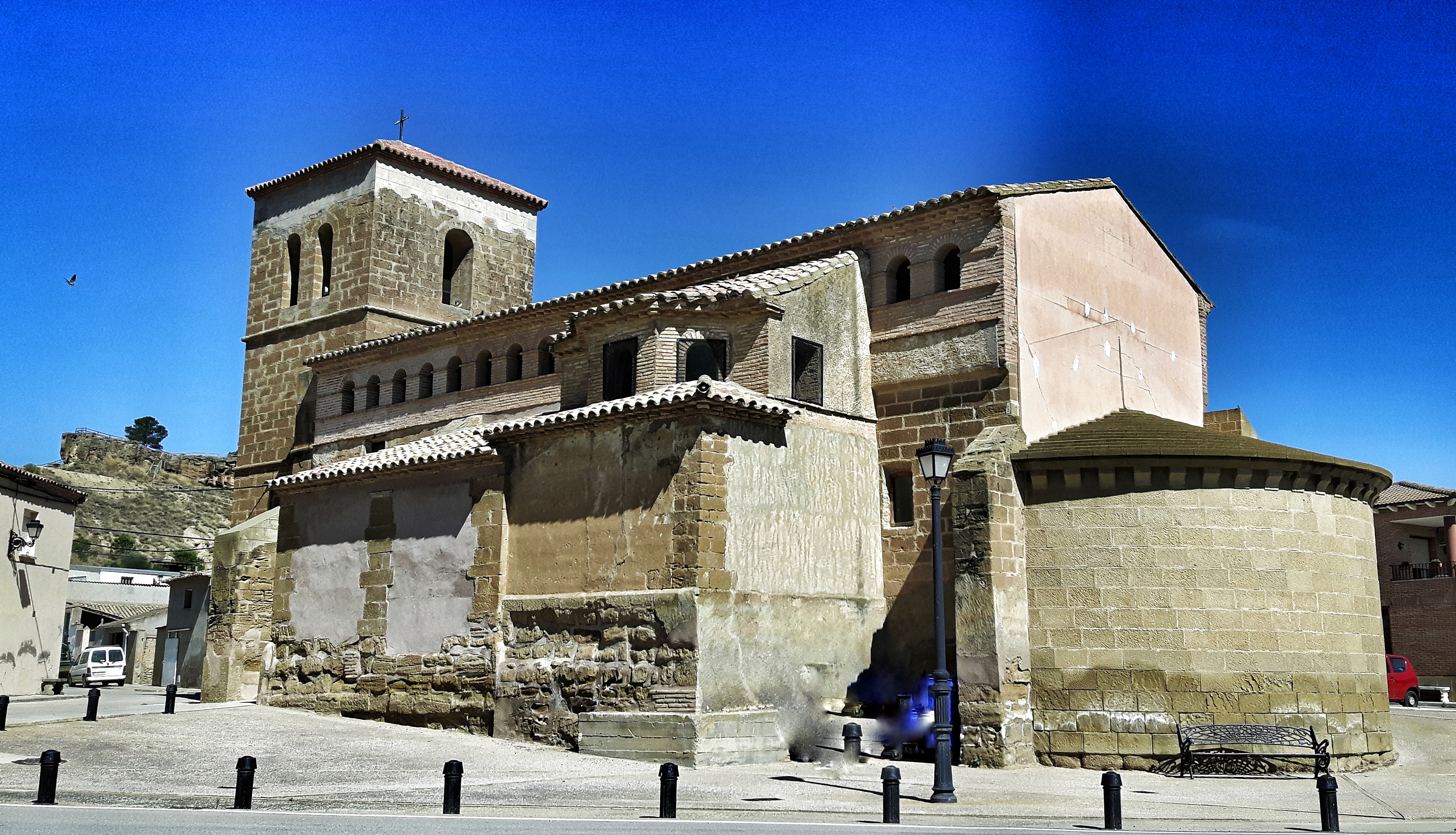 Castelflorite